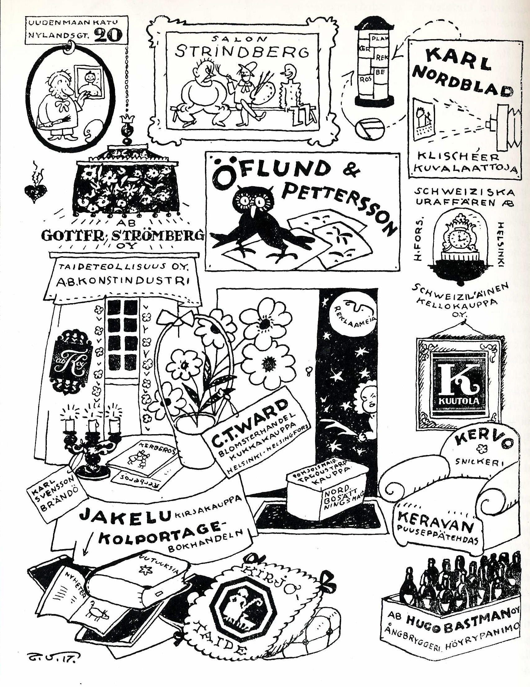 Topi Vikstedtin piirtämä Kerberos-lehden ilmoitussivu, jossa maksetut ilmoitukset on sovitettu osaksi samaa piirrosta. Kerberos 4–5/1917.